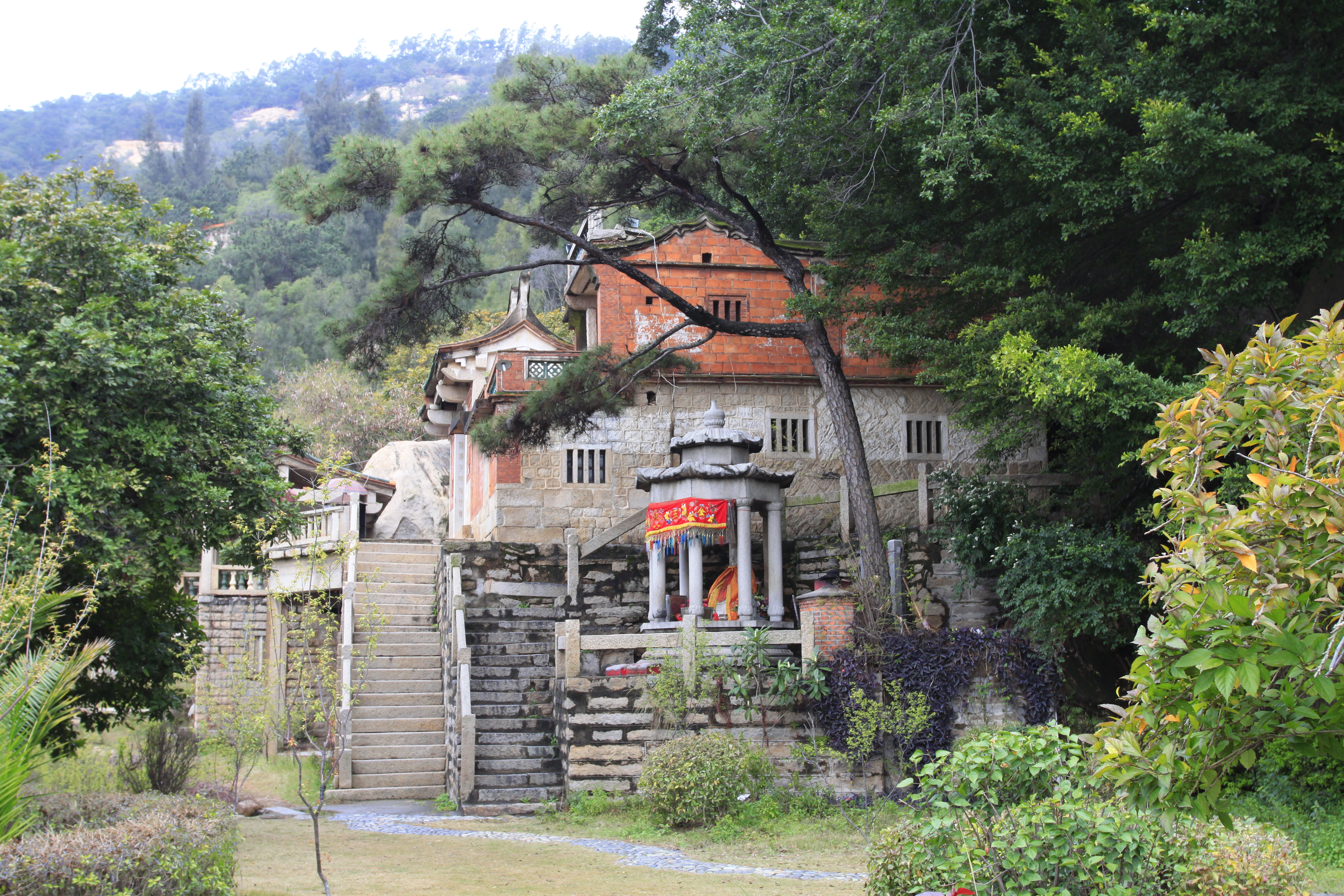 草庵，位于中国福建省晋江市，是全国重点文物保护单位。